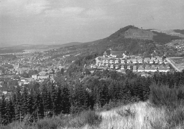 Suhl, Stadtansicht Zentralbild Schuhmann 1952 Blick auf Suhl